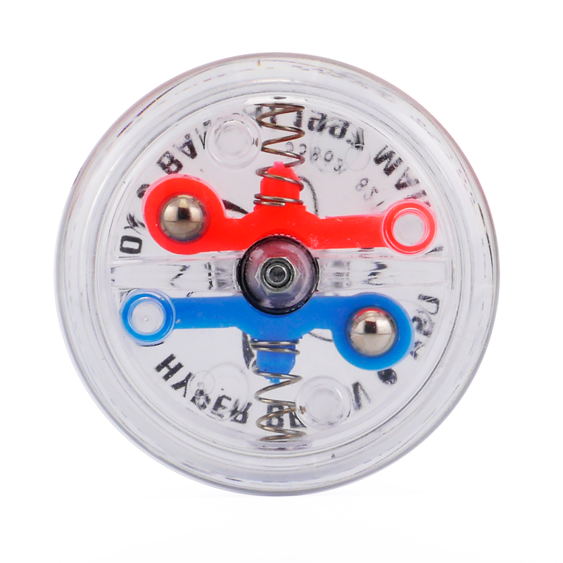 ハイパーブレイン。遠心クラッチ内蔵